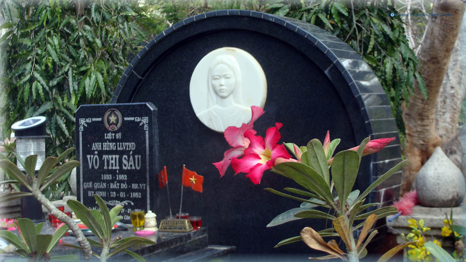 Mộ Võ Thị Sáu tại Khu B2, Nghĩa trang Hàng Dương